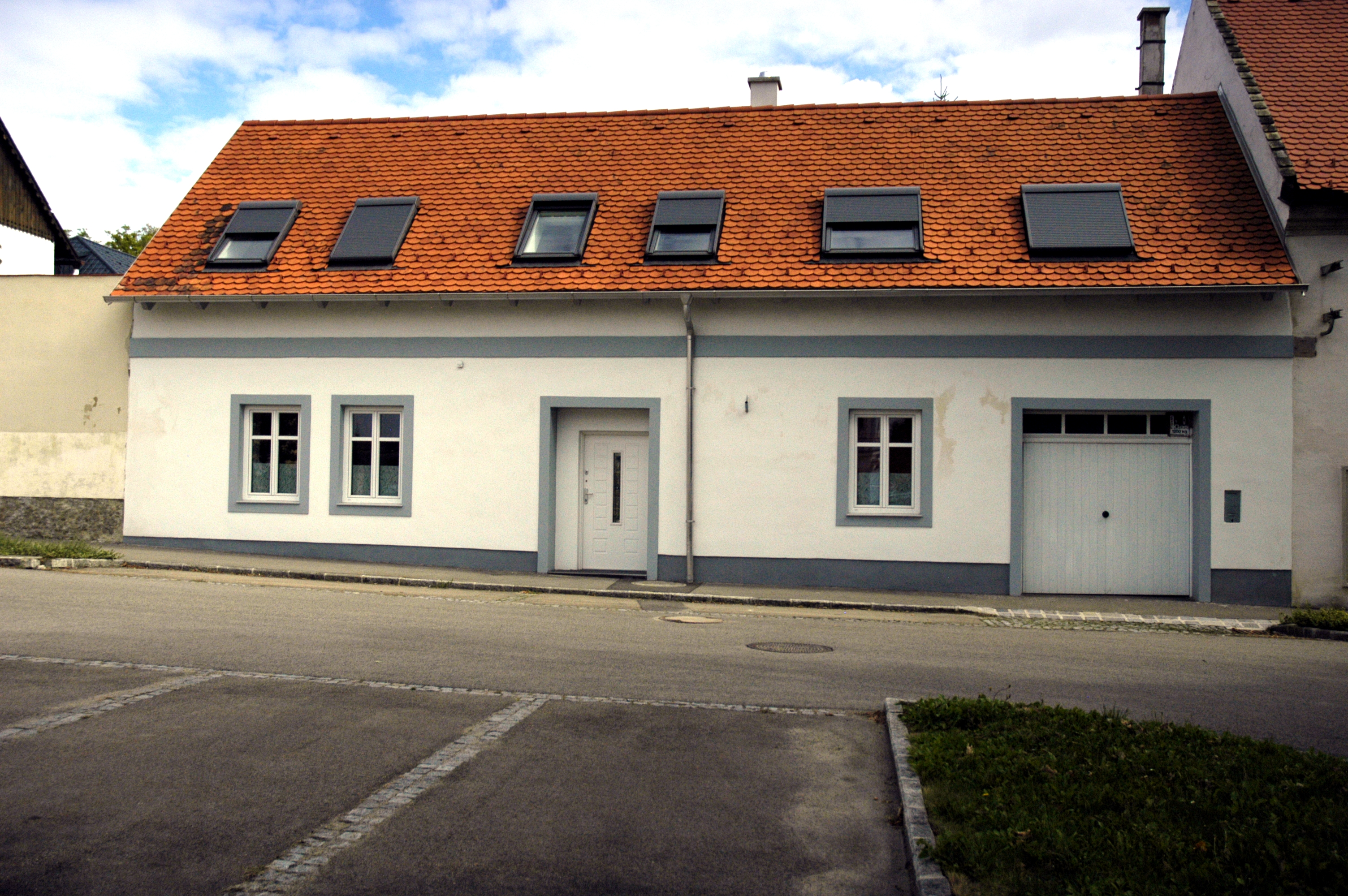 Sitzendorf Hauptplatz 5